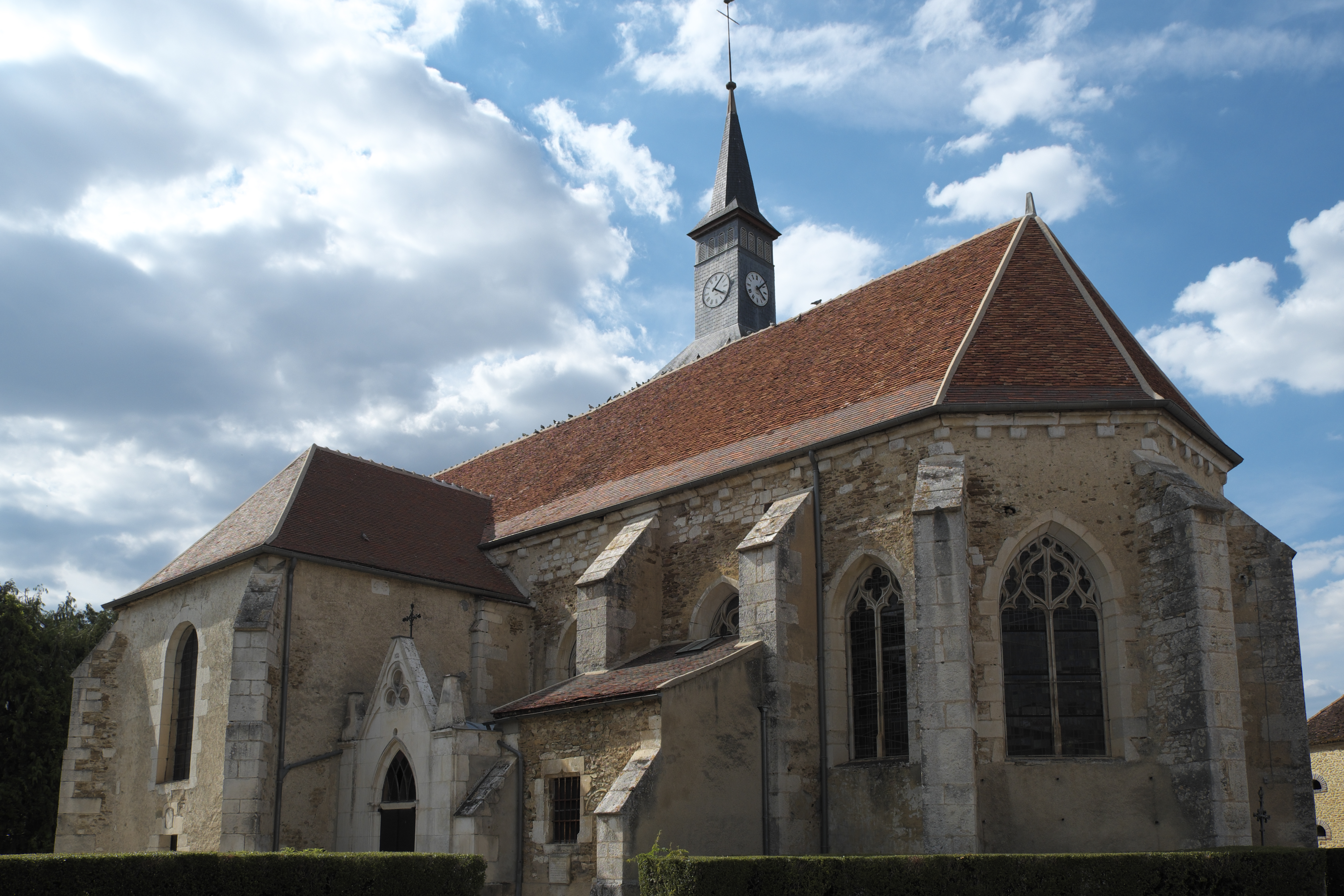 Kirche Saint-Léger in Flogny-la-Chapelle im Département Yonne (Burgund/Frankreich)